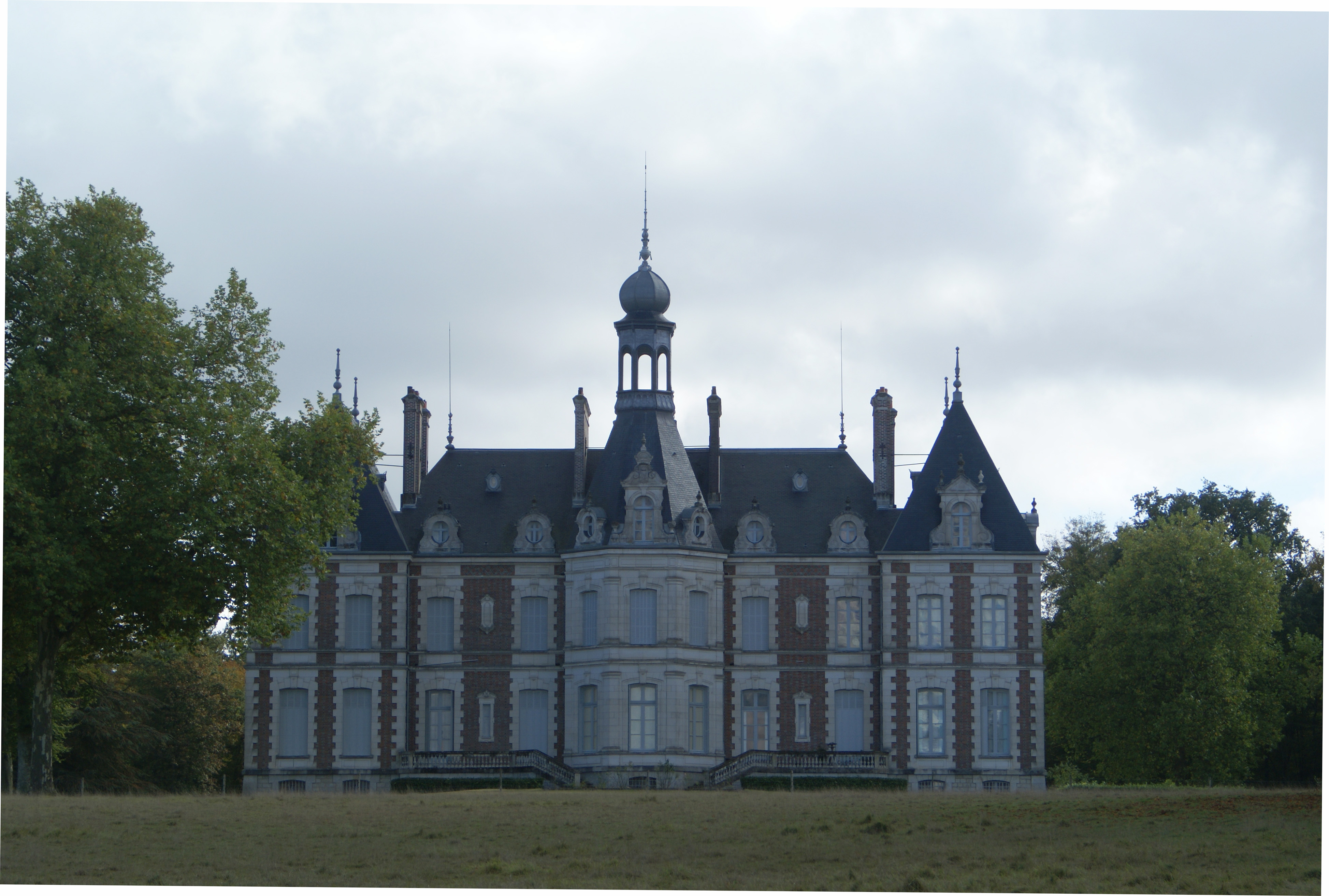 Château du Muguet à Breteau dans le Loiret (45)